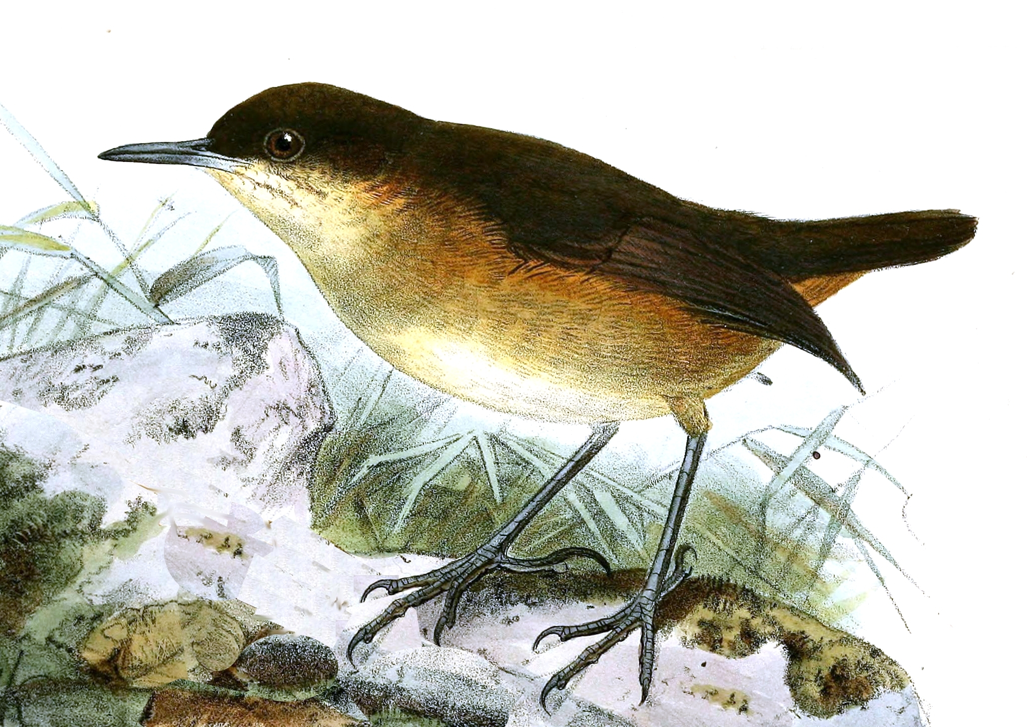 Amaurocichla bocagii (now Motacilla bocagei)